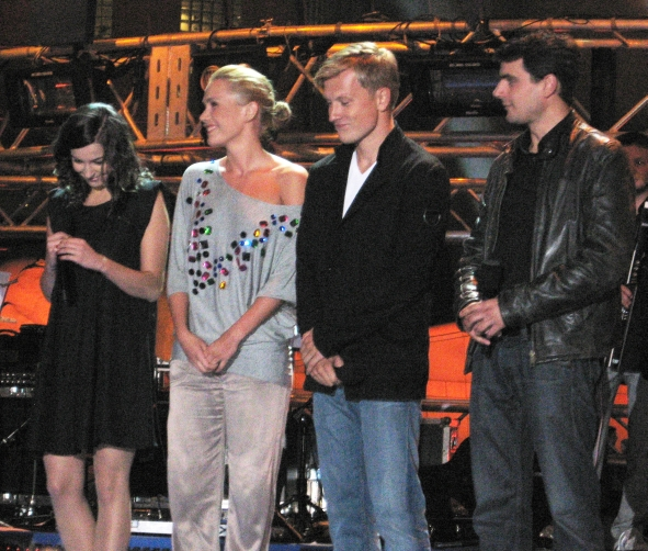 Koncert inaugurujący jesienną ramówkę TVP (Warszawa, ul. Woronicza): aktorzy serialu Czas honoru